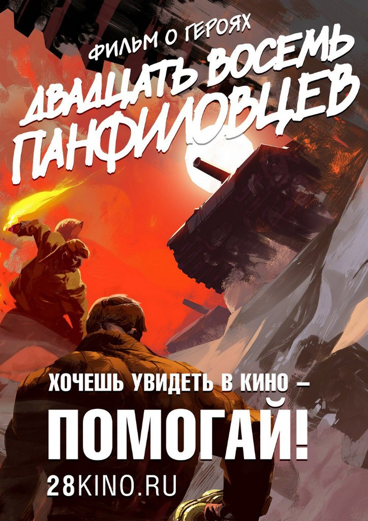 Постер, использовавшийся при сборе денег на фильм 28 панфиловцев.